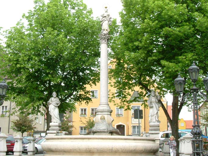 Photo personnelle